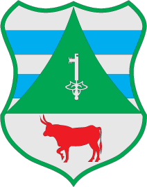 Герб Перечинського району